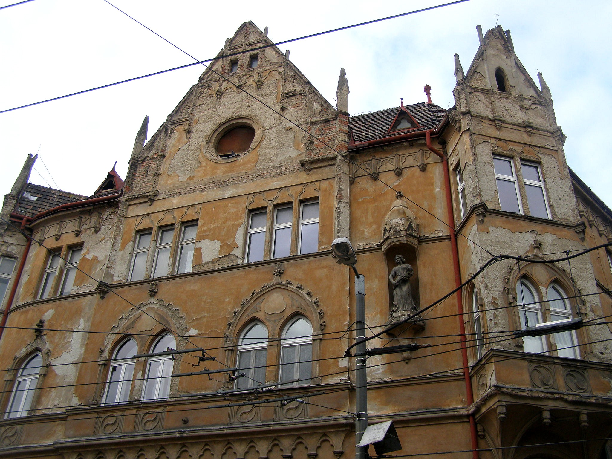 Godrova ul. č. 2. Dom leži v ohraničení ulíc Godrova, Palisády a Maróthyho. Pohľad na priečelie z ulice Palisády. Architektom domu z roku 1908 bol Jozef Erdély (Ehrenwald)